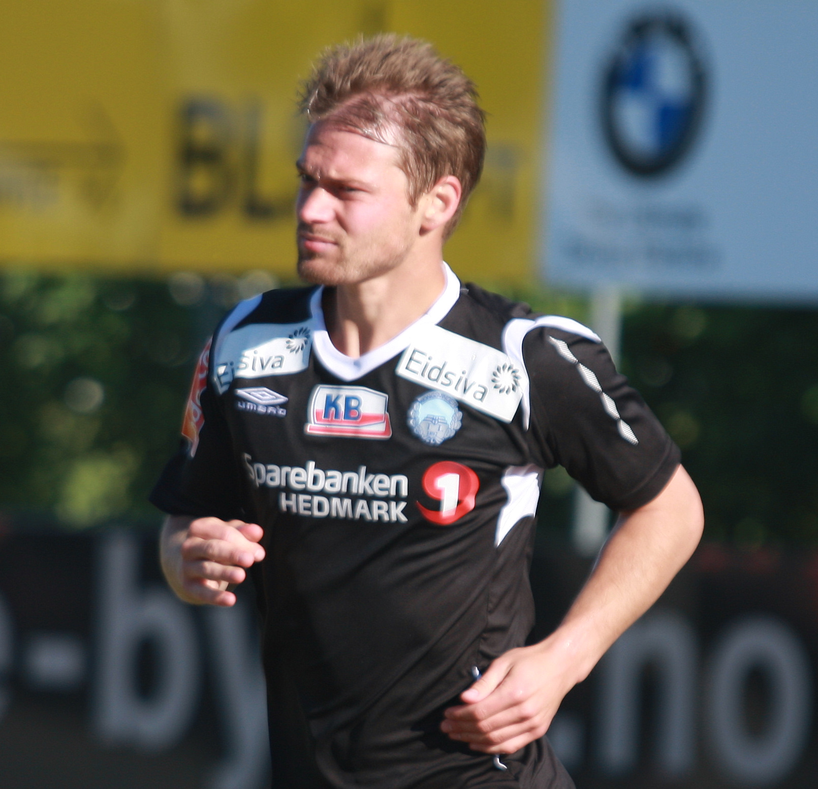 Magnus Sylling Olsen at Bryne stadion